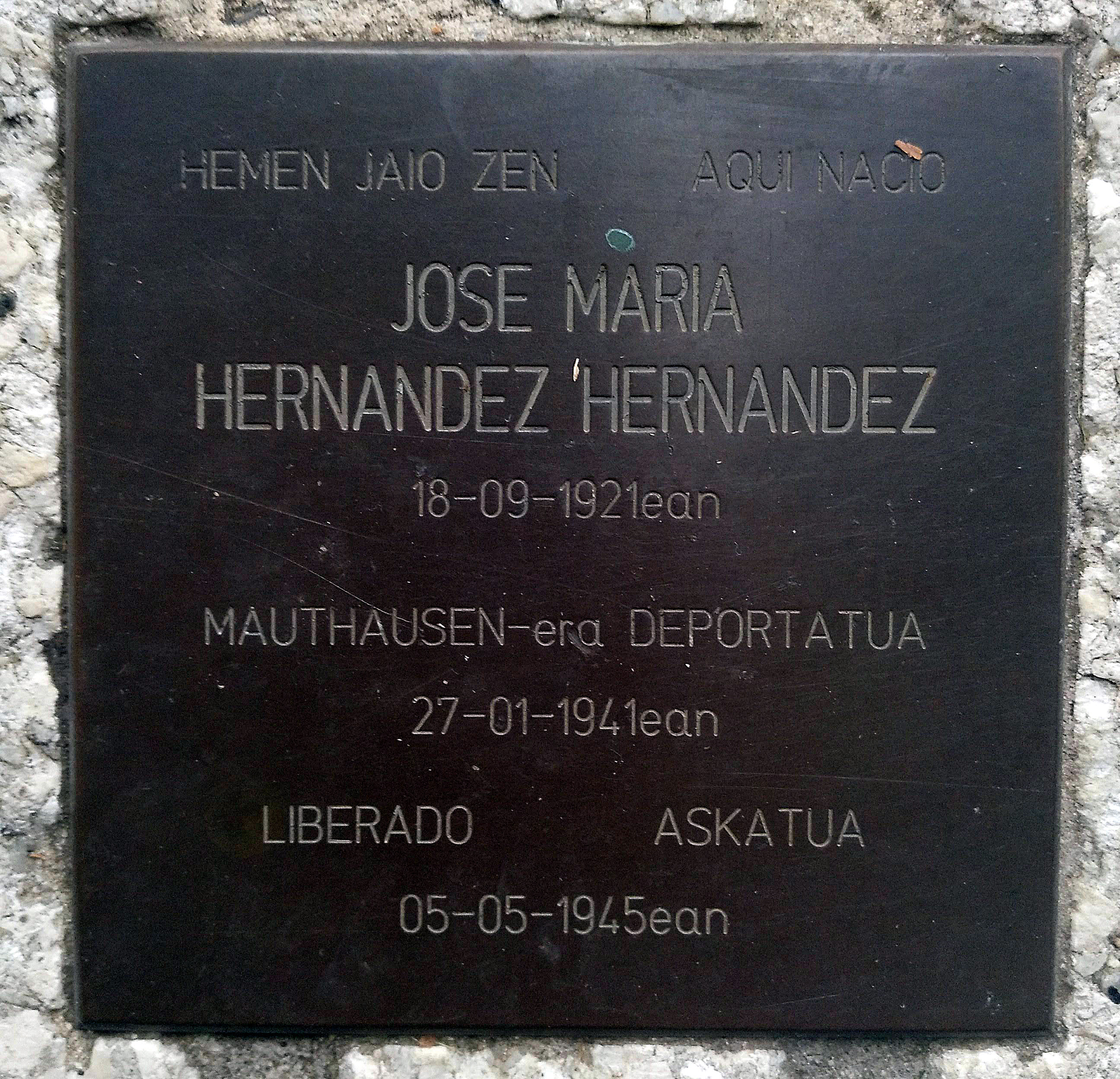 José María Hernández Hernández zarauztarra oroitzen duen Stolpersteina.